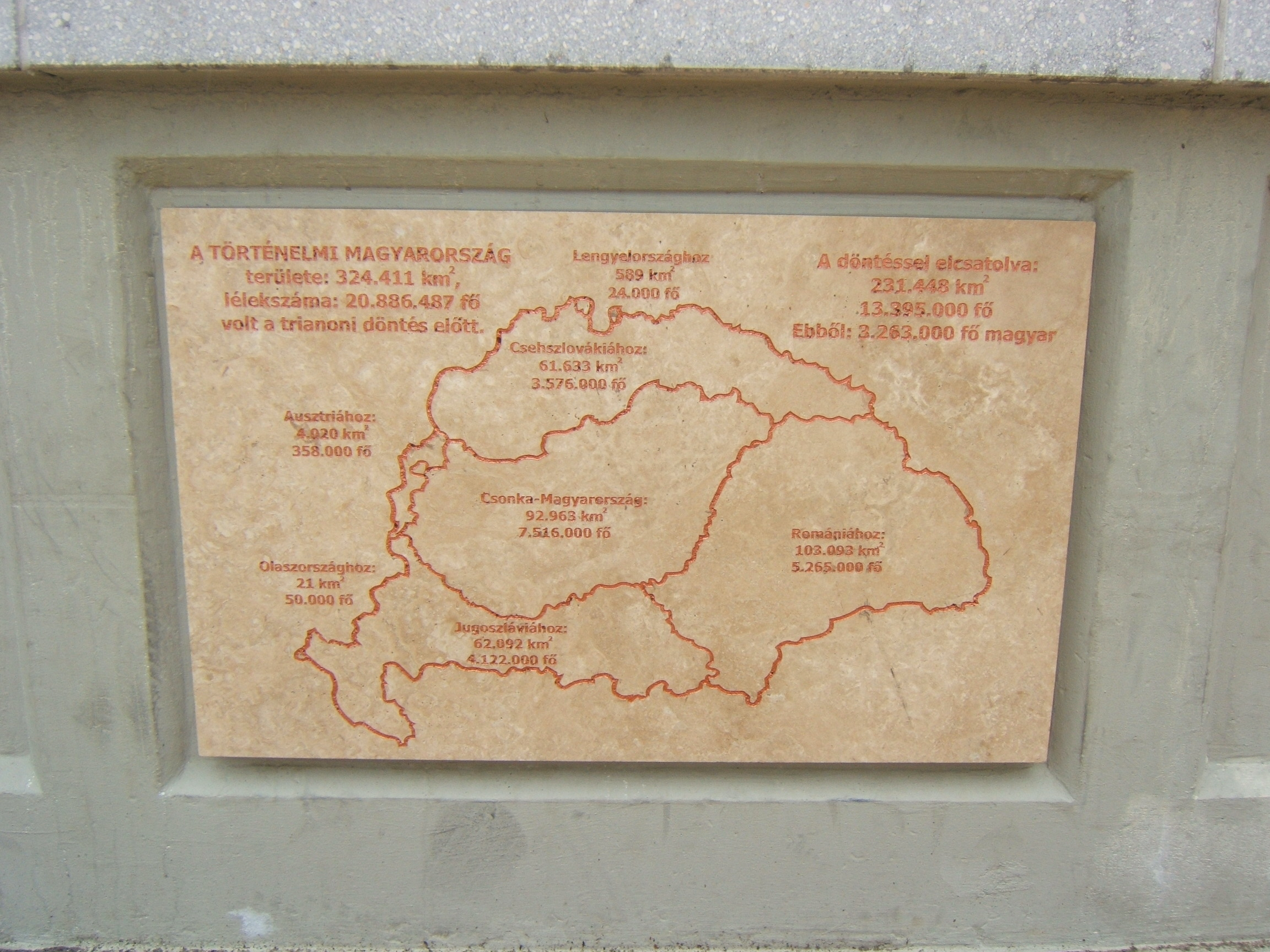 Trianon-emléktábla, Szolnok